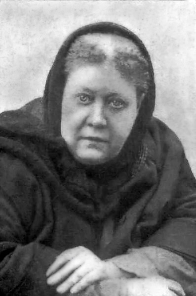 Helena Petrovna Blavatsky (1831-1891), November 1888